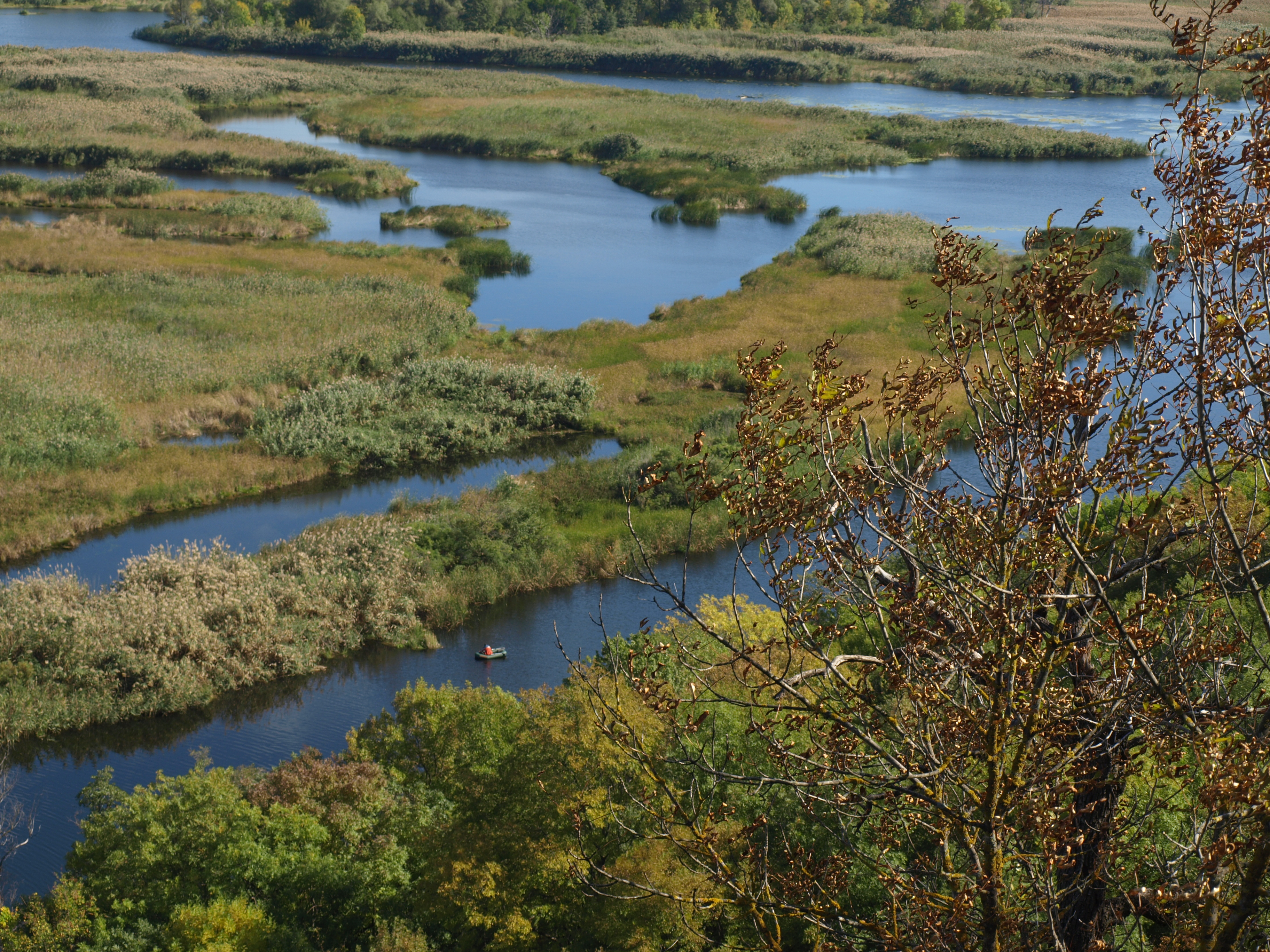 Нижньоворсклянський, Кобеляцький район, Долина р. Ворскла з острівною системою в Дніпродзержинському водосховищі (між селами Правобережна та Лівобережна Сокілки, Вільхуватка, Орлик, Радянське, Лучки, Світлогірське), ДП «Кременчуцький лісгосп»: Кишенське л-во кв. 6-18, 32-65, Новоорлицьке л-во, кв. 1, 3-10, 12-16, 19-34, 44, 35 (вид. 15-21, 23)